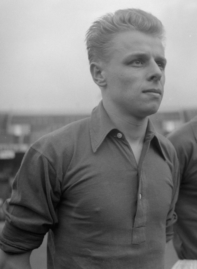 Wim Huis